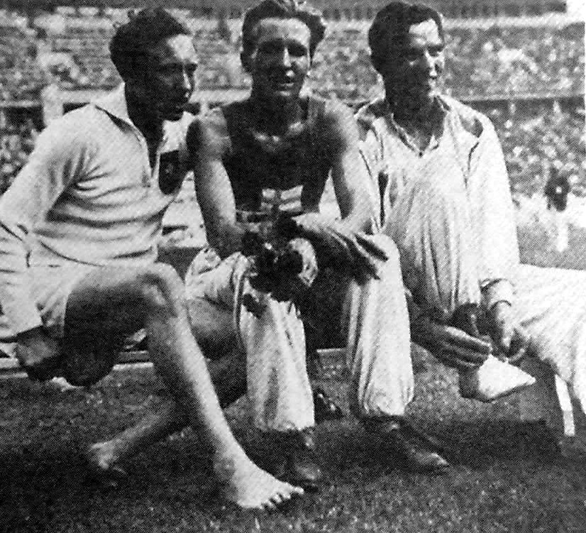 Alfred Dompert 1936 (en la izquierda) junto a los finlandeses(centro y derecha) medalla de oro y plata en los 3000 metros obstáculos